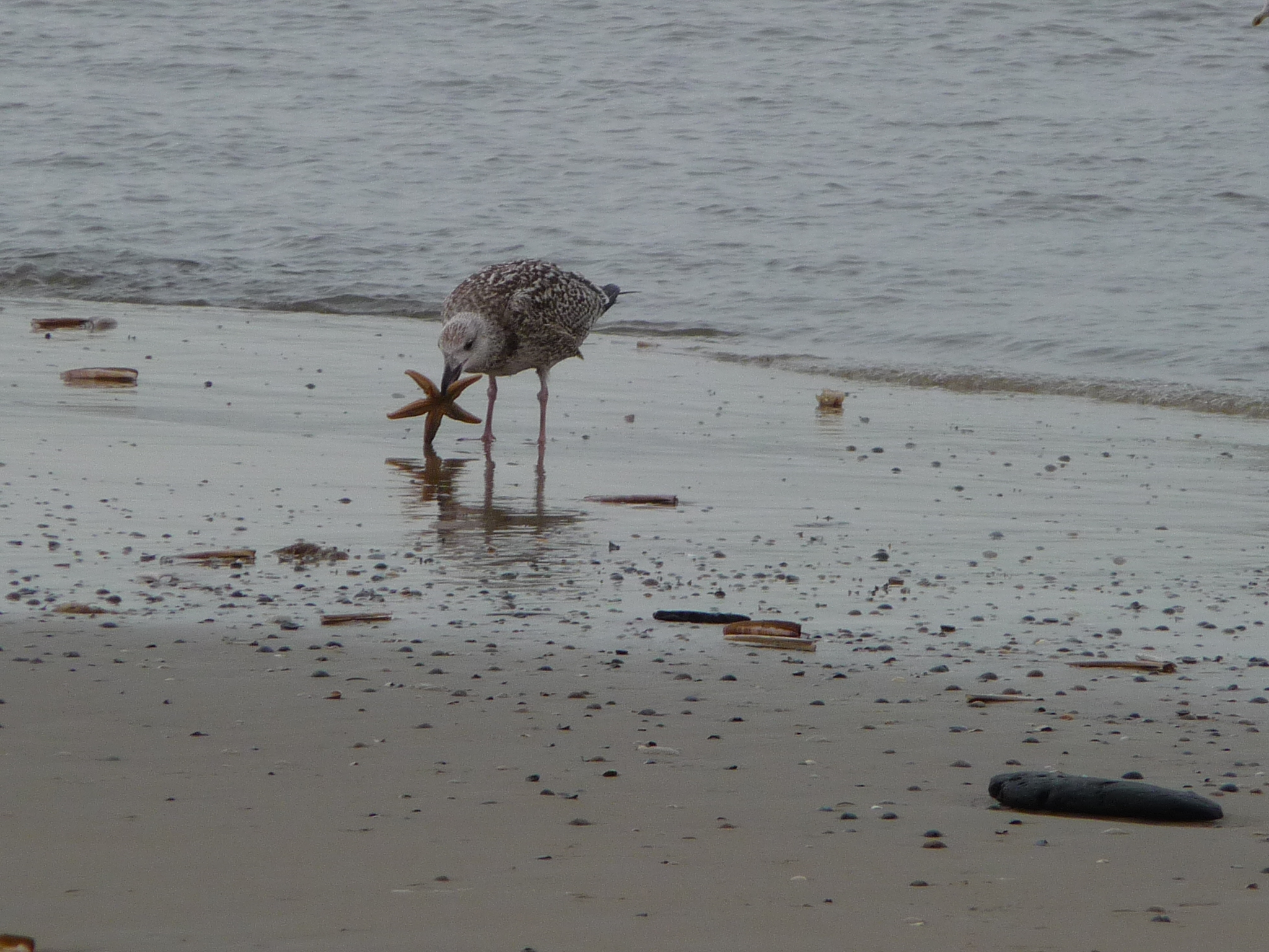 Gemeiner Seestern (Asterias rubens) als Nahrung für eine junge Silbermöwe (Larus argentatus), fotografiert am Strand der ostfriesischen Nordseeinsel Juist (Niedersachsen, Deutschland)